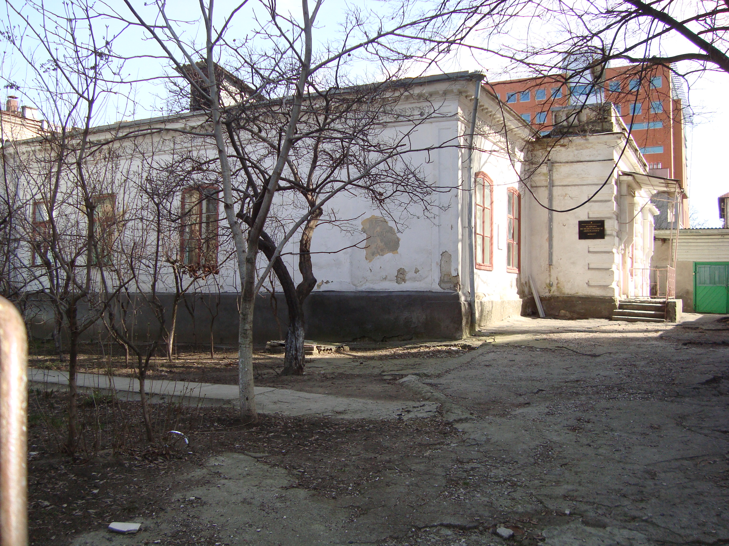 Casa Reginei Natalia din Chisinau